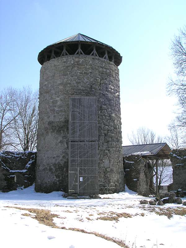 Burg Haltenberg, Der Bergfried von Westen